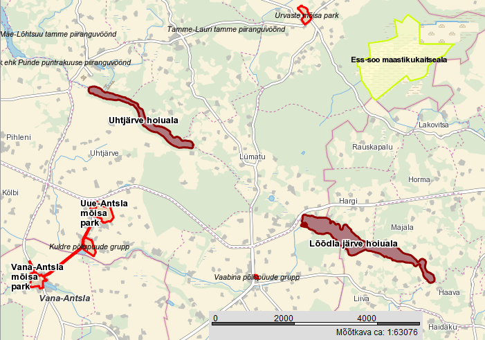 Ess-soo MKA ja tesite lähipiirkonna hoiualade paiknemine kaardil. Põhineb Maa-ameti kaardil.